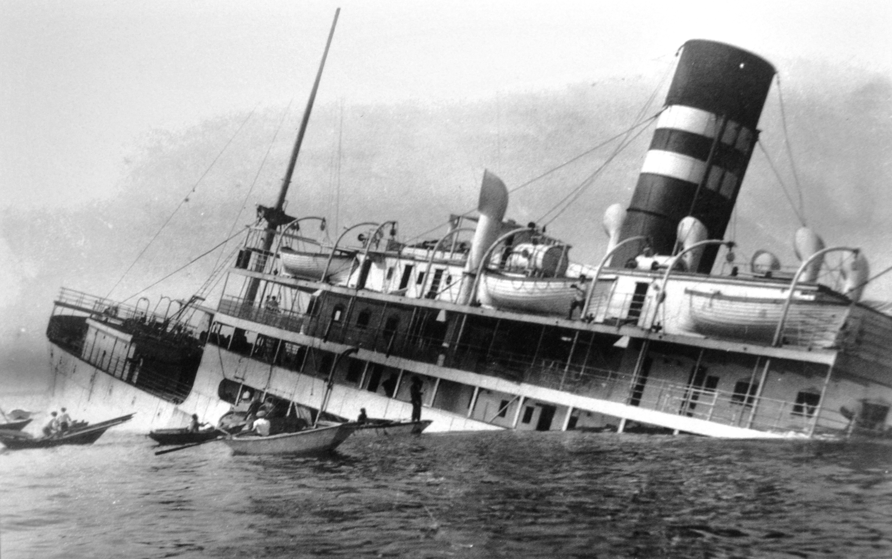 Véxase o título e as categorías